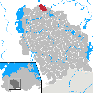 Blankenberg in Mecklenburg-Vorpommern - District Parchim